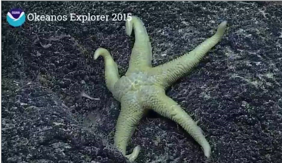 Pythonaster sp. observed in the abyss off Hawaii by the NOAA Okeanos Explorer mission 2015.